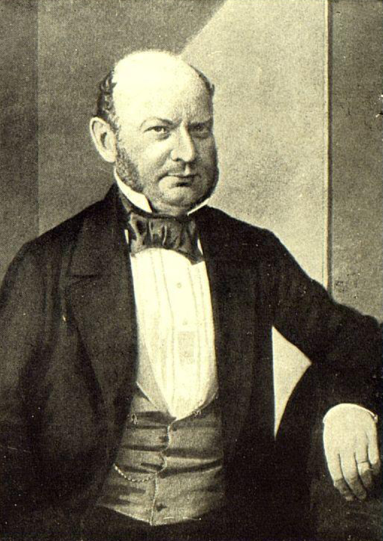 Барон Людвиг Гауф, соучредитель Санкт-Петербургского частного коммерческого банка